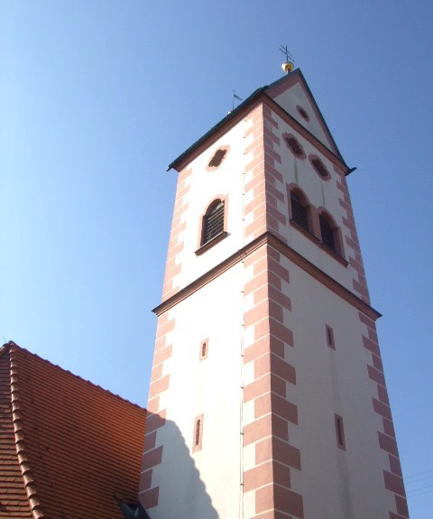 Pfarrkirche St. Pankratius, Emerfeld, Gemeinde Langenenslingen, Kirchturm